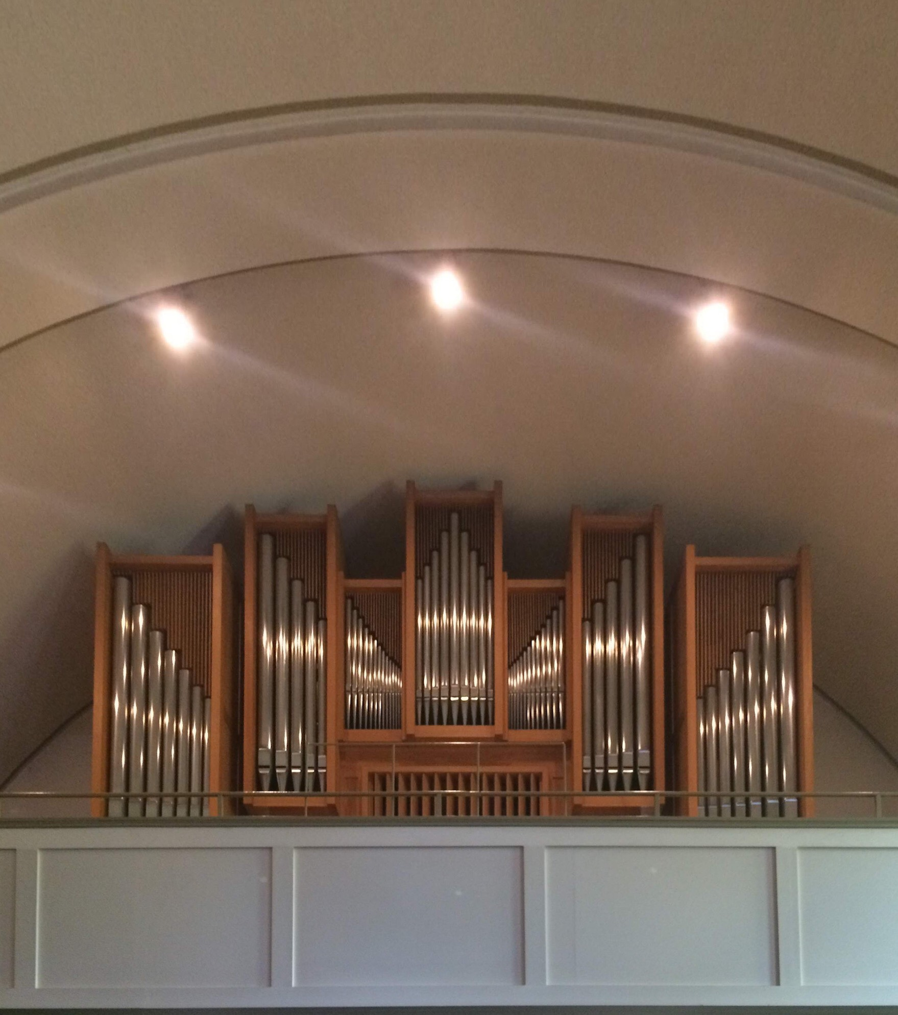 Orgel der Friedenskirche Offenbach am Main